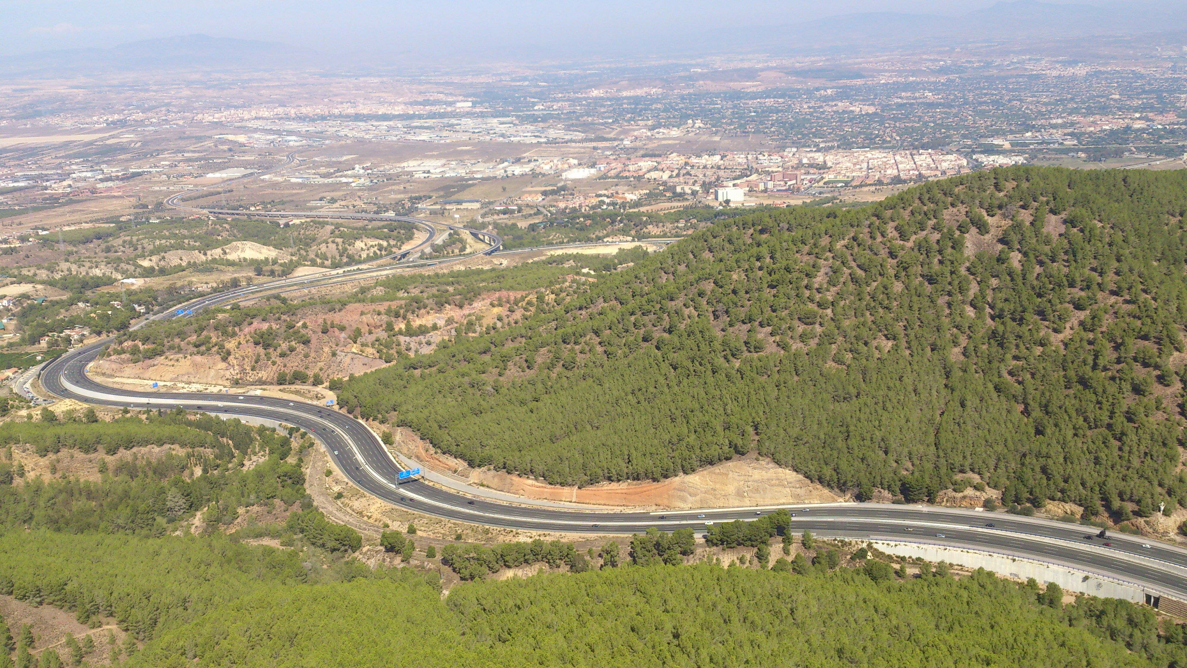 A-30 y MU-31 desde el Castillo de La Asomada